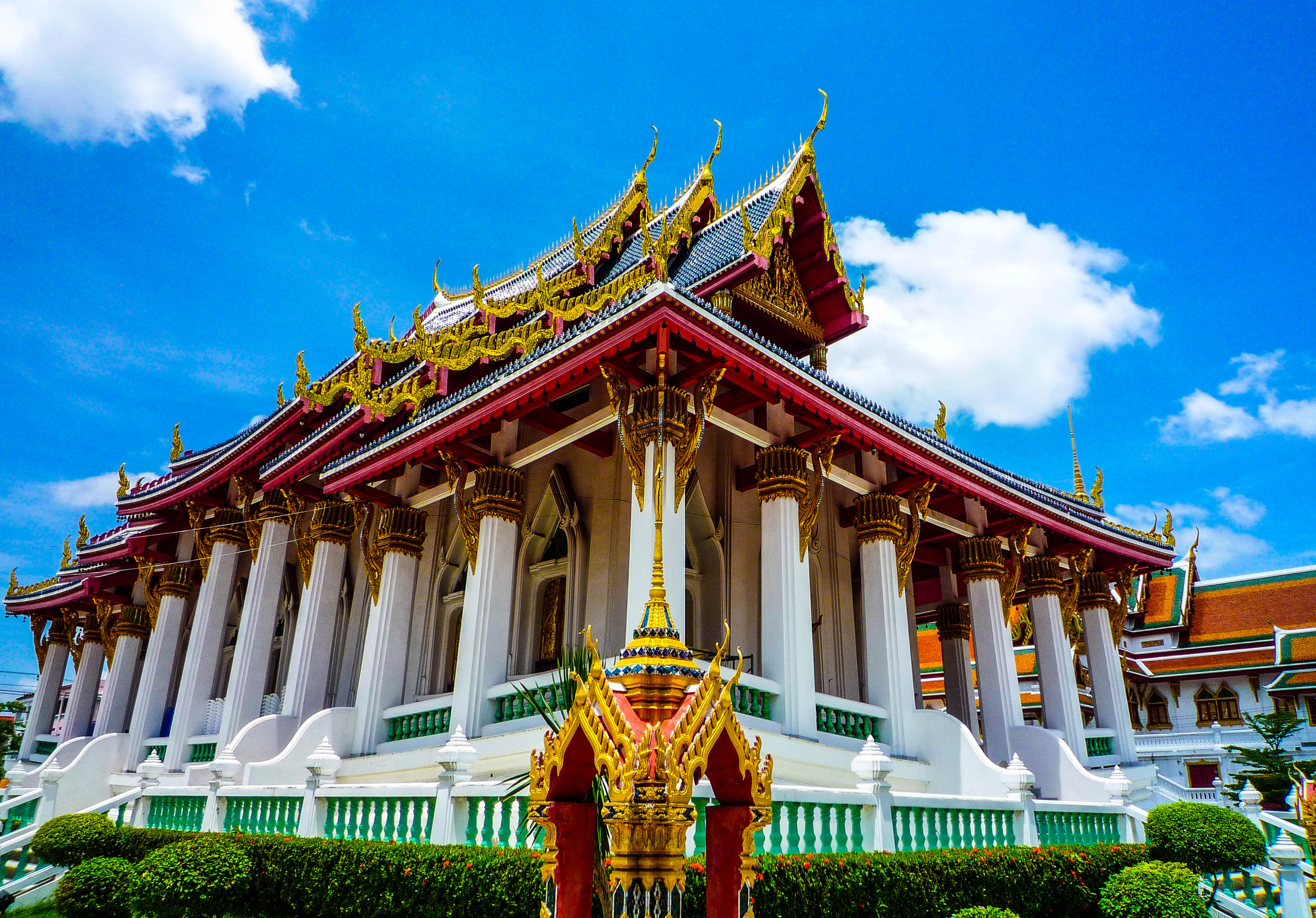 วัดบึงทองหลาง